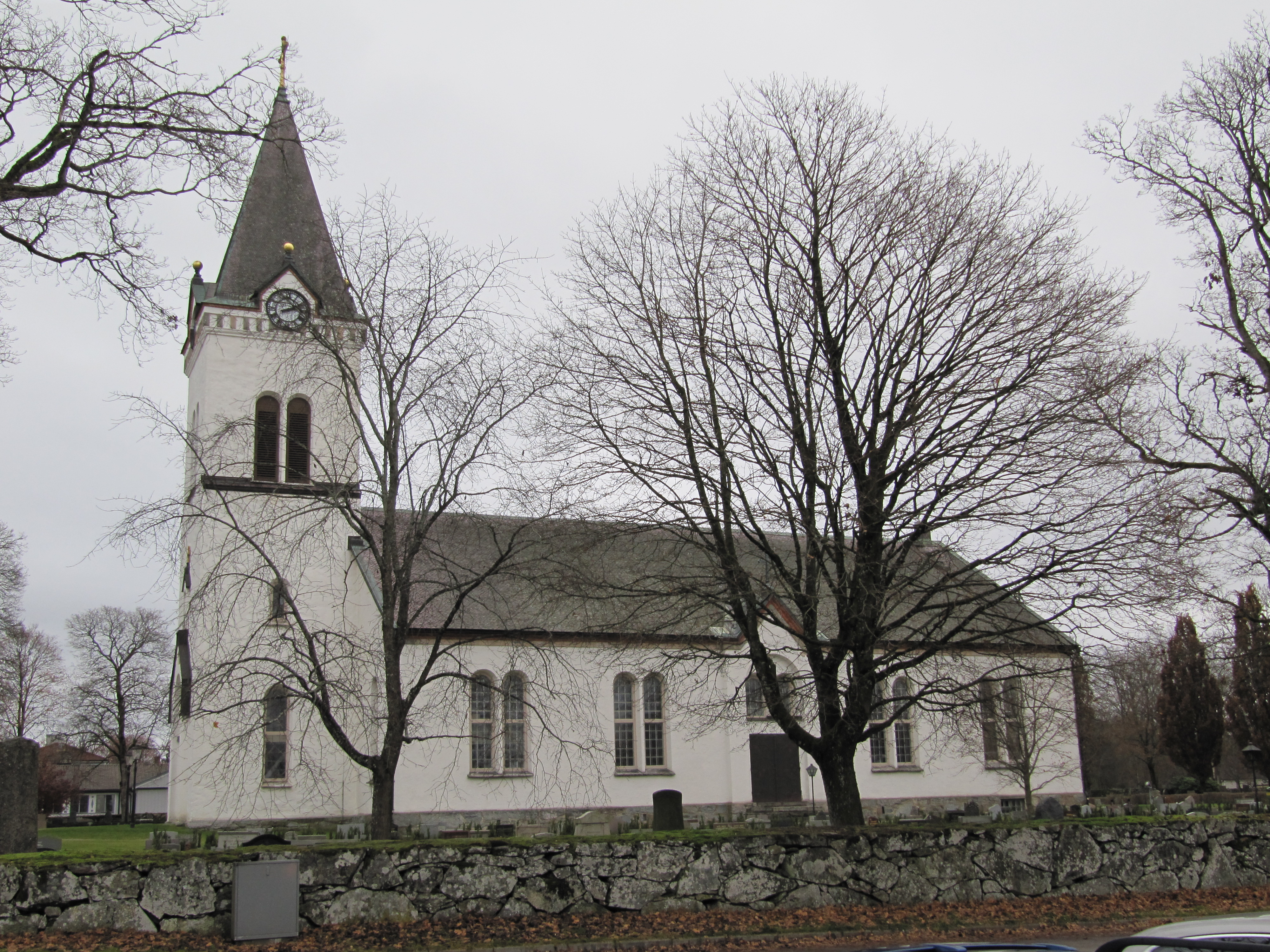 Vrigstads kyrka